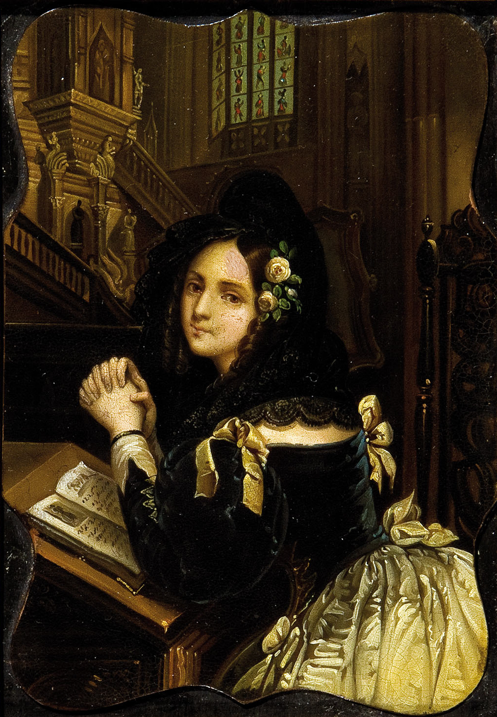 Betenden Dame in einem Kirchinterieur. Lackmalerei auf Metallblech, 12 x 8,5 cm. Braunschweig, Stobwasser, um 1830